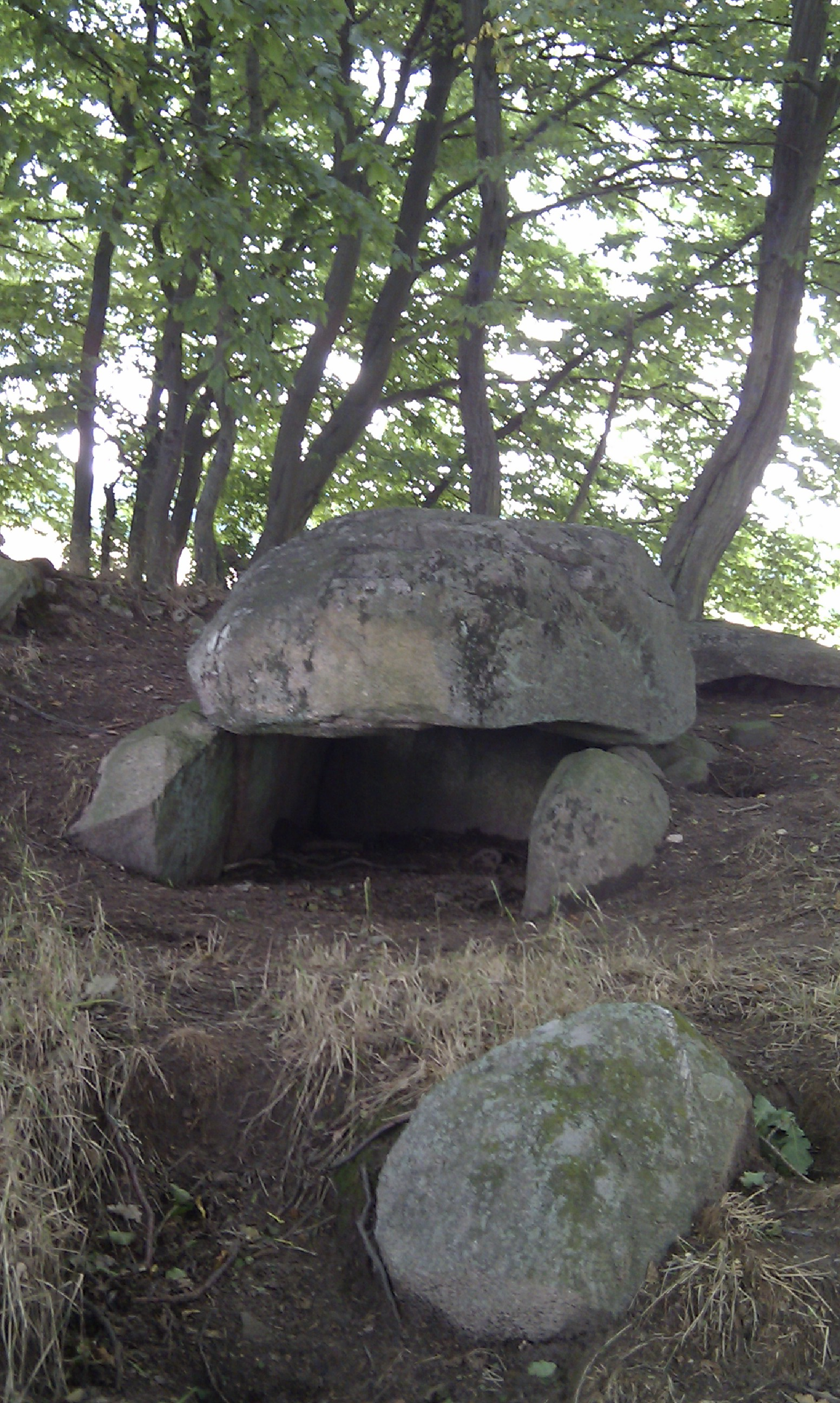 Pustow 5 Erweiterter Dolmen Sprockhoff-Nr. 538 Eingang